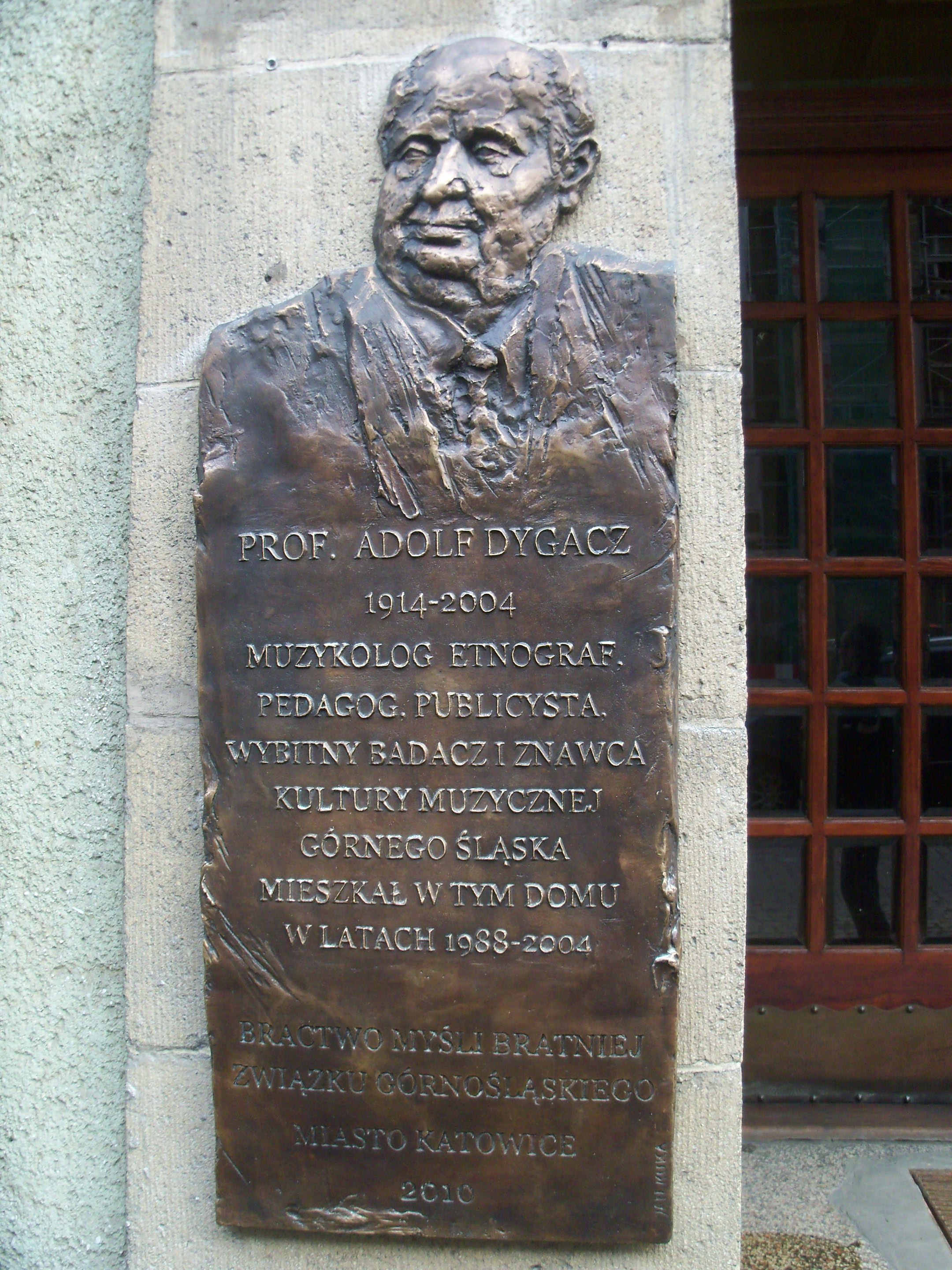 Tablica poświęcona Adolfowi Dygaczowi w Katowicach przy ul. Wita Stwosza 4